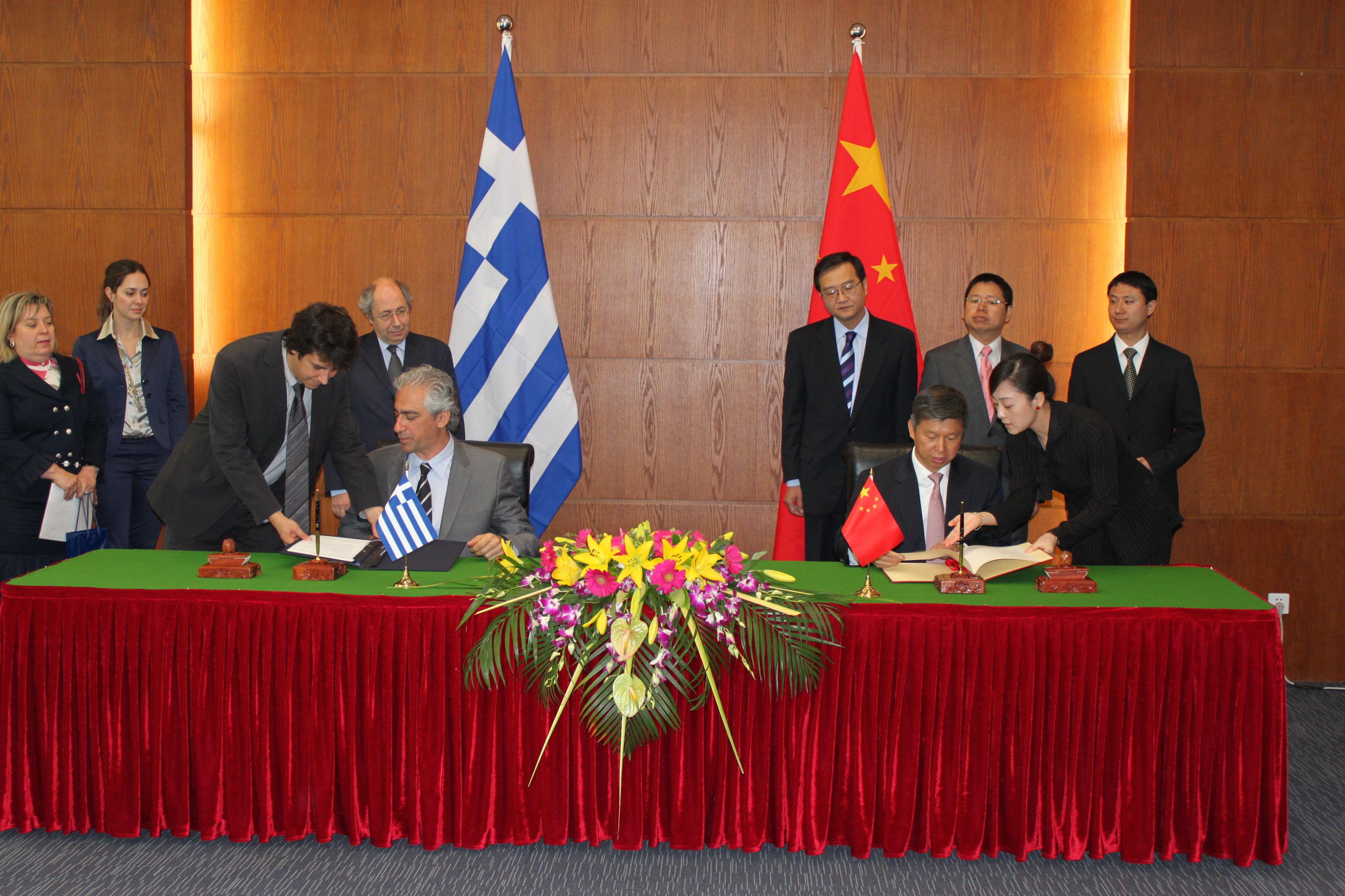 Ο ΥΦΥΠΕΞ, κ. Κουβέλης και ο ομόλογός του ΥΦΥΠΕΞ, κ. Song Tao στην υπογραφή της κοινής συμφωνίας για τις διευκολύνσεις εισόδου για Έλληνες και Κινέζους πολίτες Deputy FM Kouvelis visiting Beijing (15-17 May 2011)